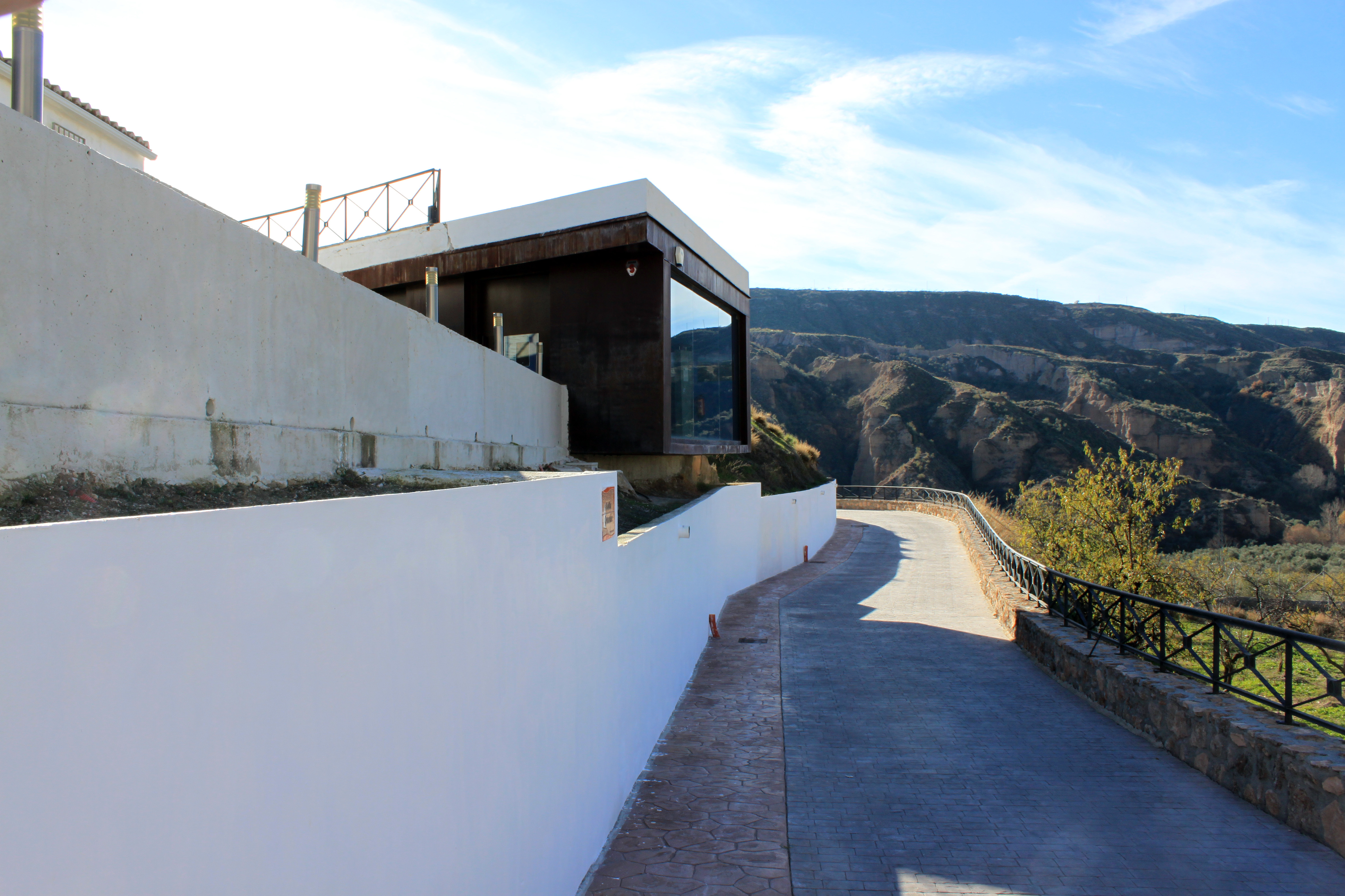 Centro de Interpretación del Megalitismo en Gorafe, provincia de Granada, Andalucía, España.